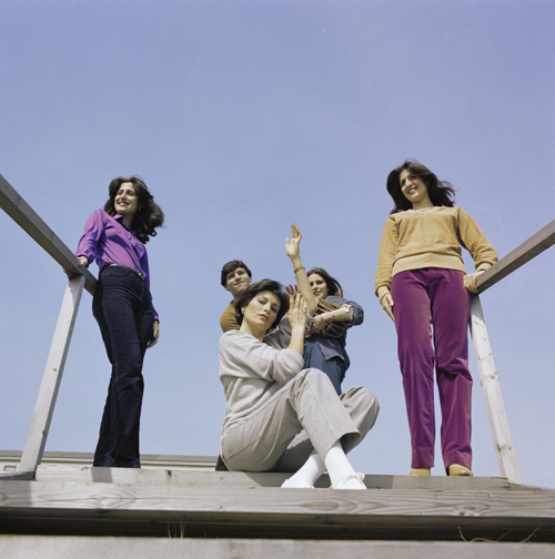 De Turkse zangeres Ajda Pekkan en haar groep tijdens een fotosessie voor het Eurovisie Songfestival 1980